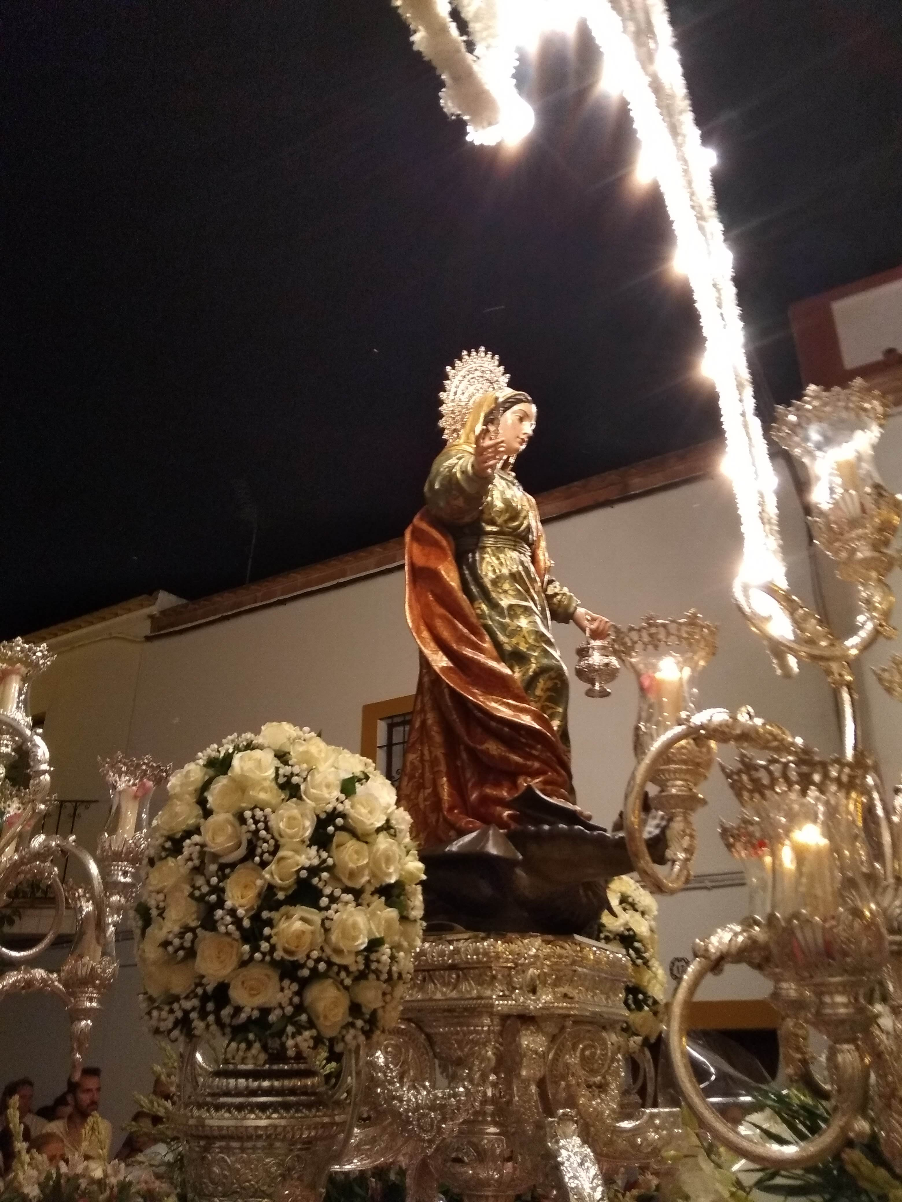 santa marta en su paso